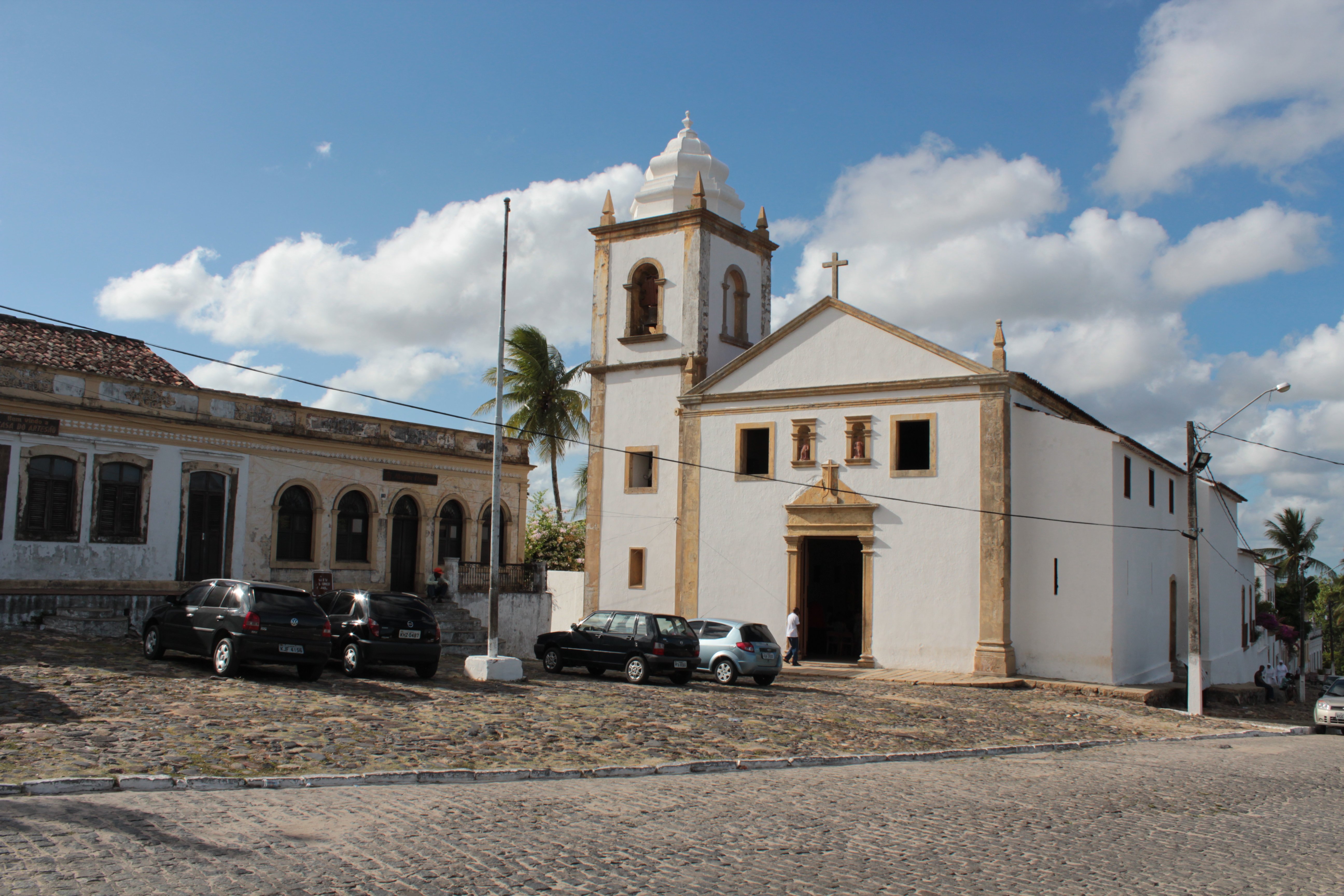 Igreja dos Santos Cosme e Damião - Igarassu, Pernambuco, Brasil